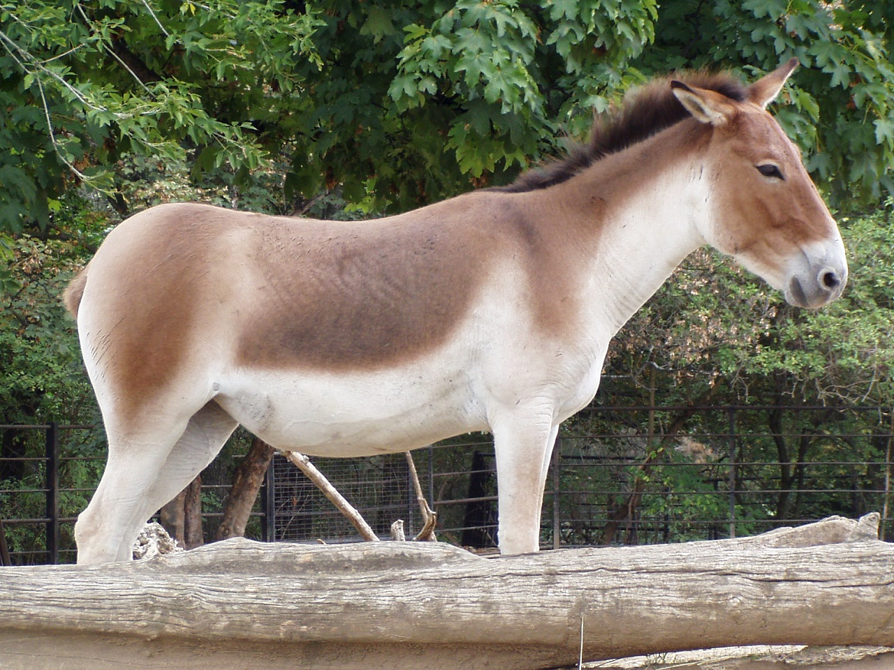 Equus kiang holdereri (Prague Zoo)